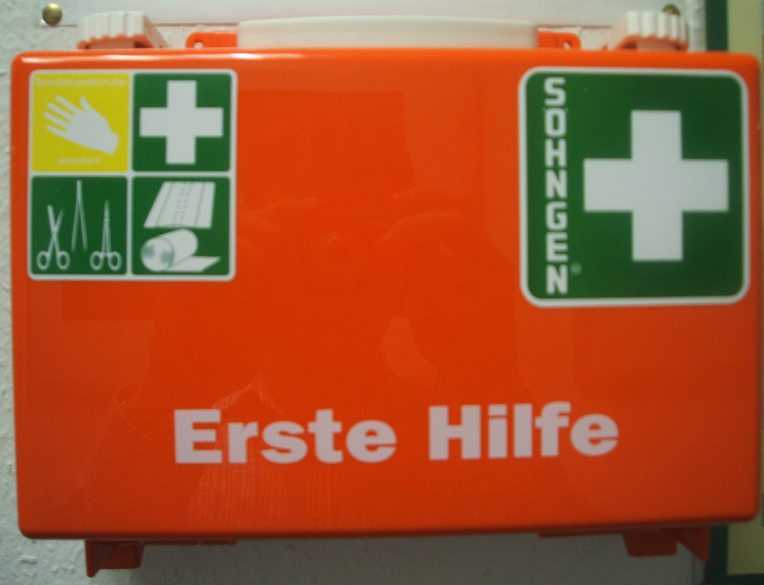 Erste-Hilfe-Kasten von Söhngen